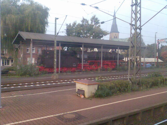 Bahnhof von Salzbergen mit Denkmalslok der Baureihe 44